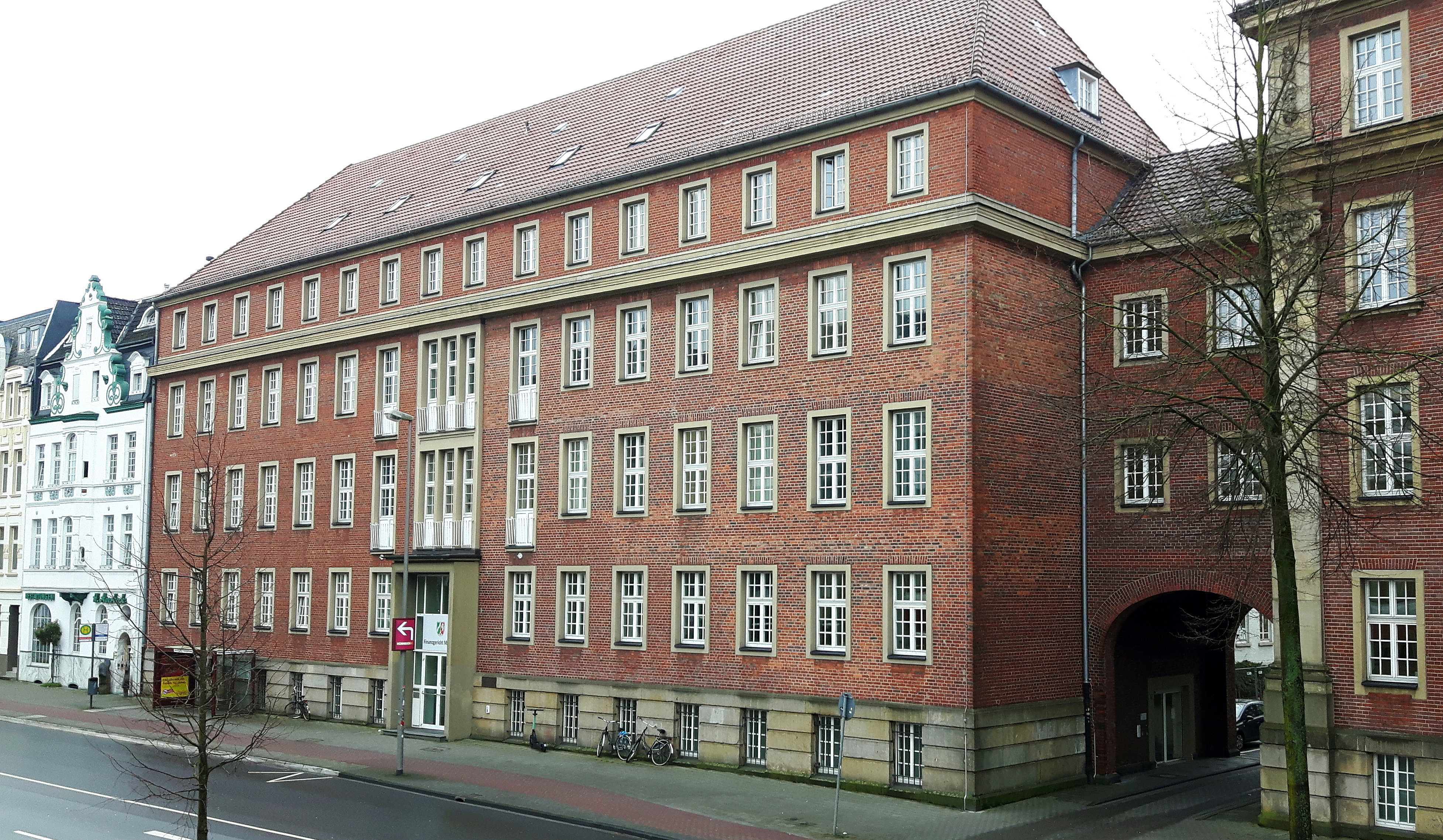 Finanzgericht in Münster, Germany.